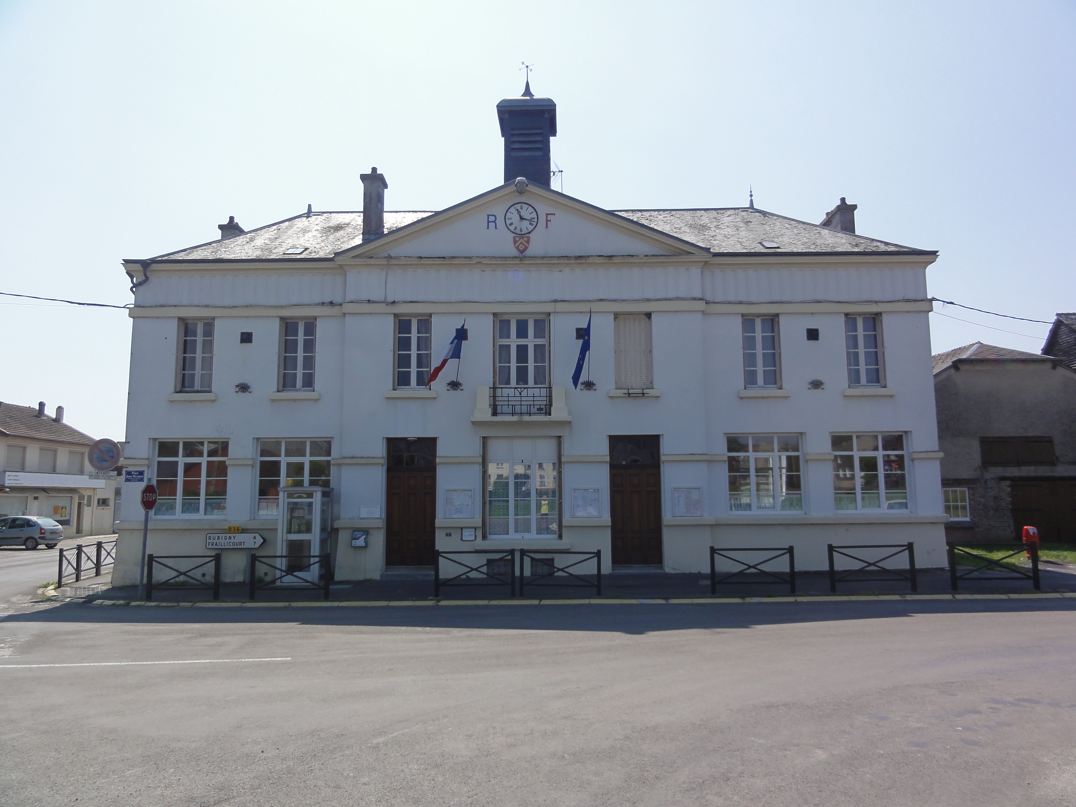 Rocquigny (Ardennes) mairie